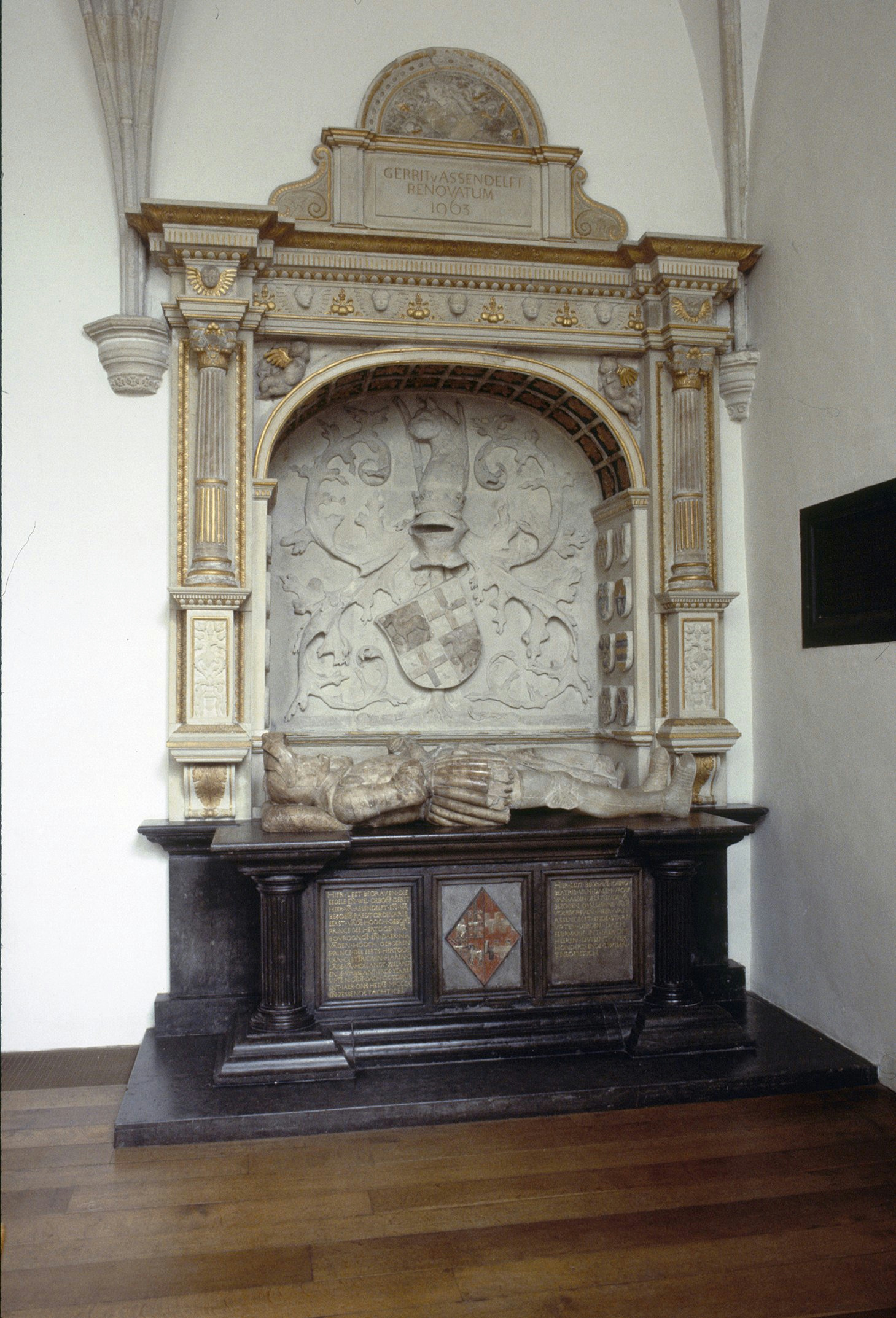 NEDERLANDS HERVORMDE KERK (GROTE- OF SINT JACOBSKERK): INTERIEUR, OVERZICHT GRAFMONUMENT VAN GERRIT VAN ASSENDELFT